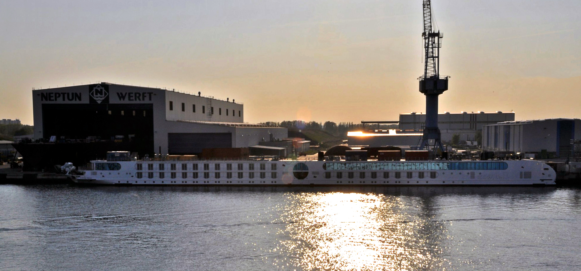 Werft